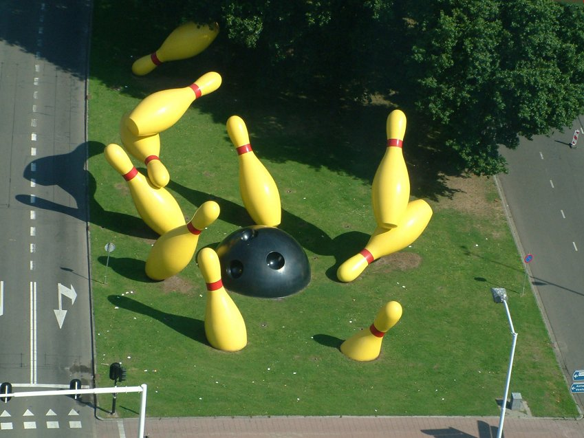 Flying Pins, kunstwerk in Eindhoven van Claes Oldenburg en Coosje van Bruggen